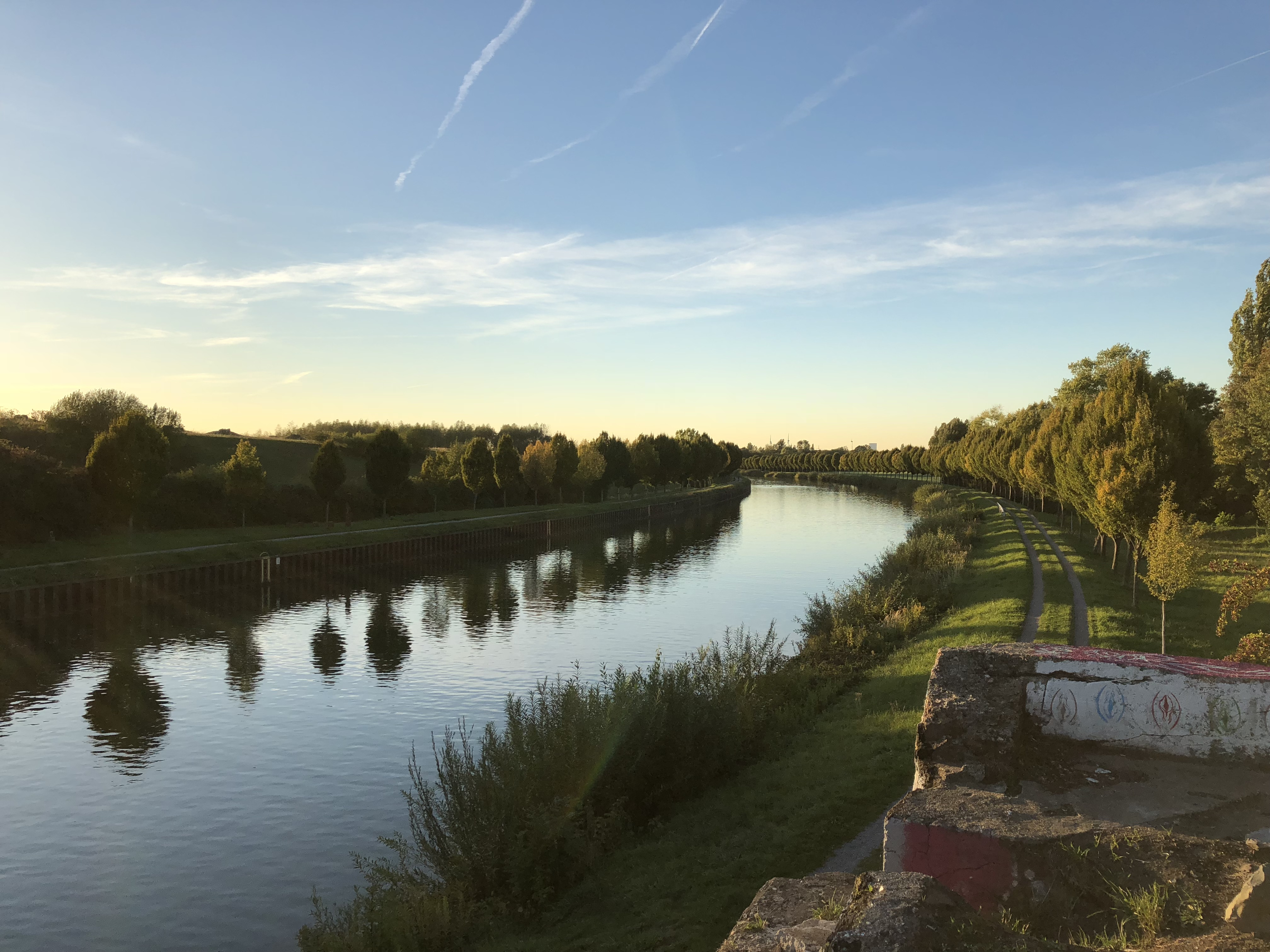 Alter Zechenhafen in Schweringhausen 2018